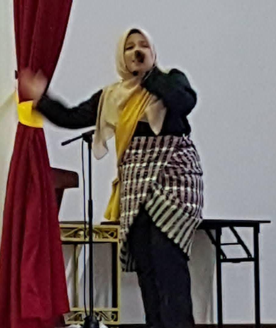 Pelajar mempersembahkan sajak Hari Kemerdekaan pada Pelancaran Bulan Kemerdekaan